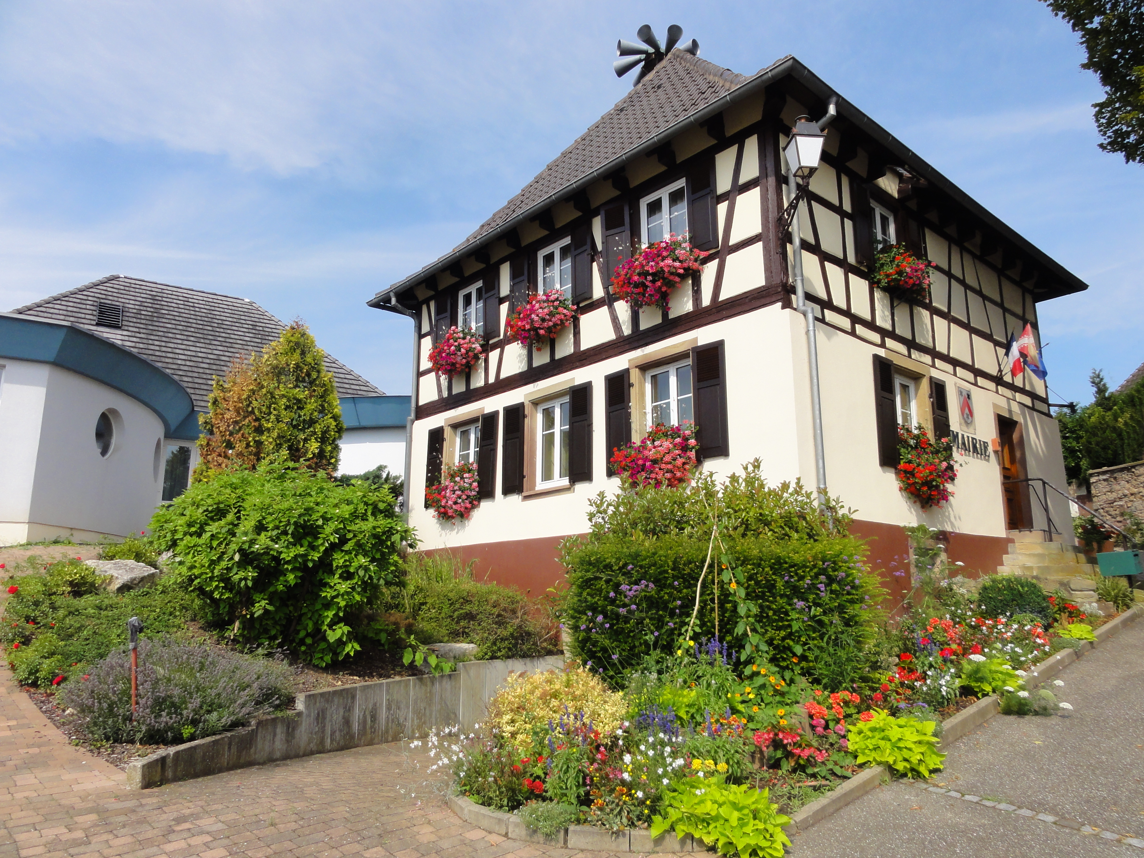 Alsace, Bas-Rhin, Durningen, Mairie. .